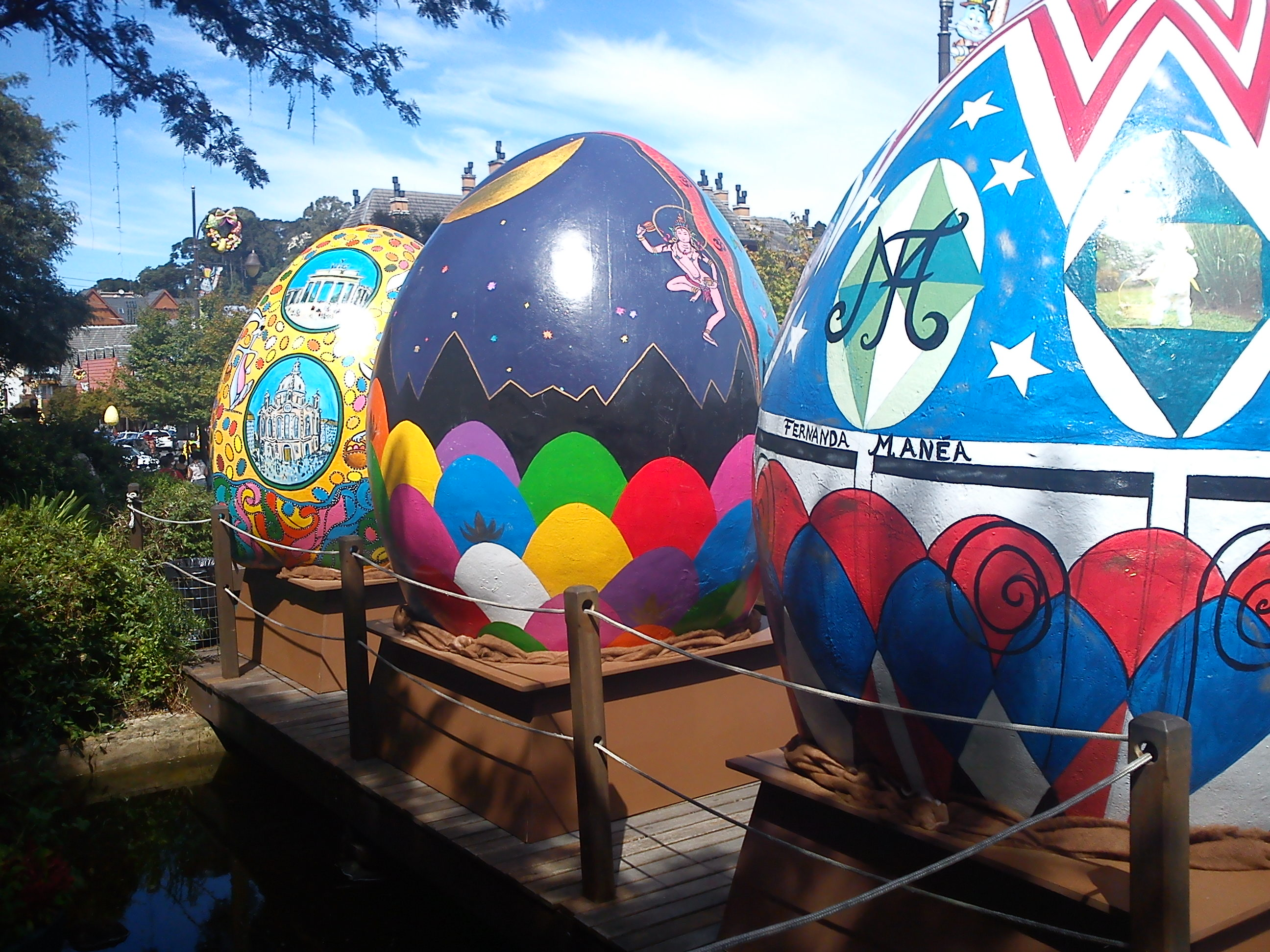 Exposição de ovos de Páscoa gigantes em Gramado - RS - Brasil.